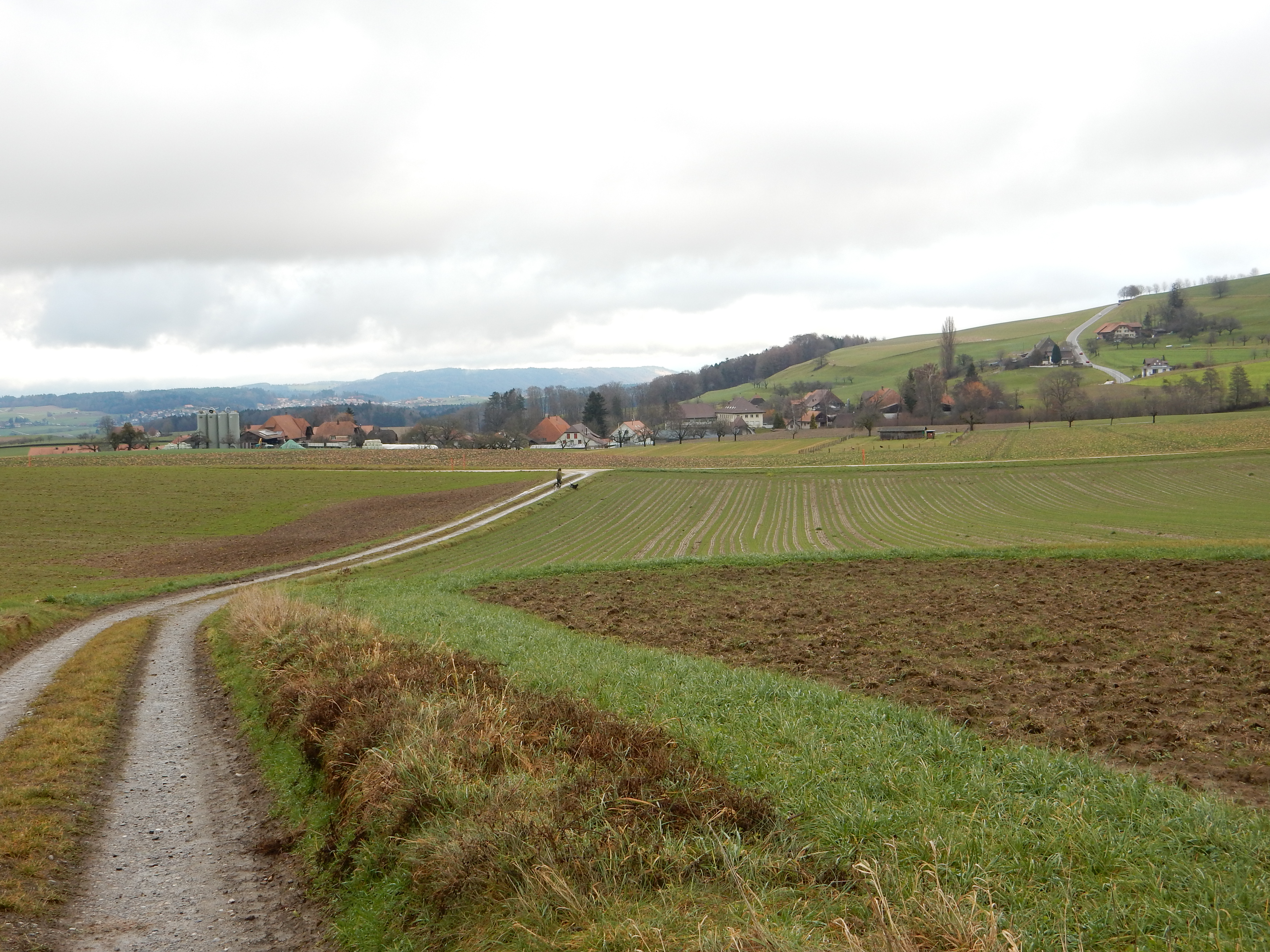 Das Dorf Baggwil, Gemeinde Seedorf BE (Schweiz) von Südwesten aus gesehen.